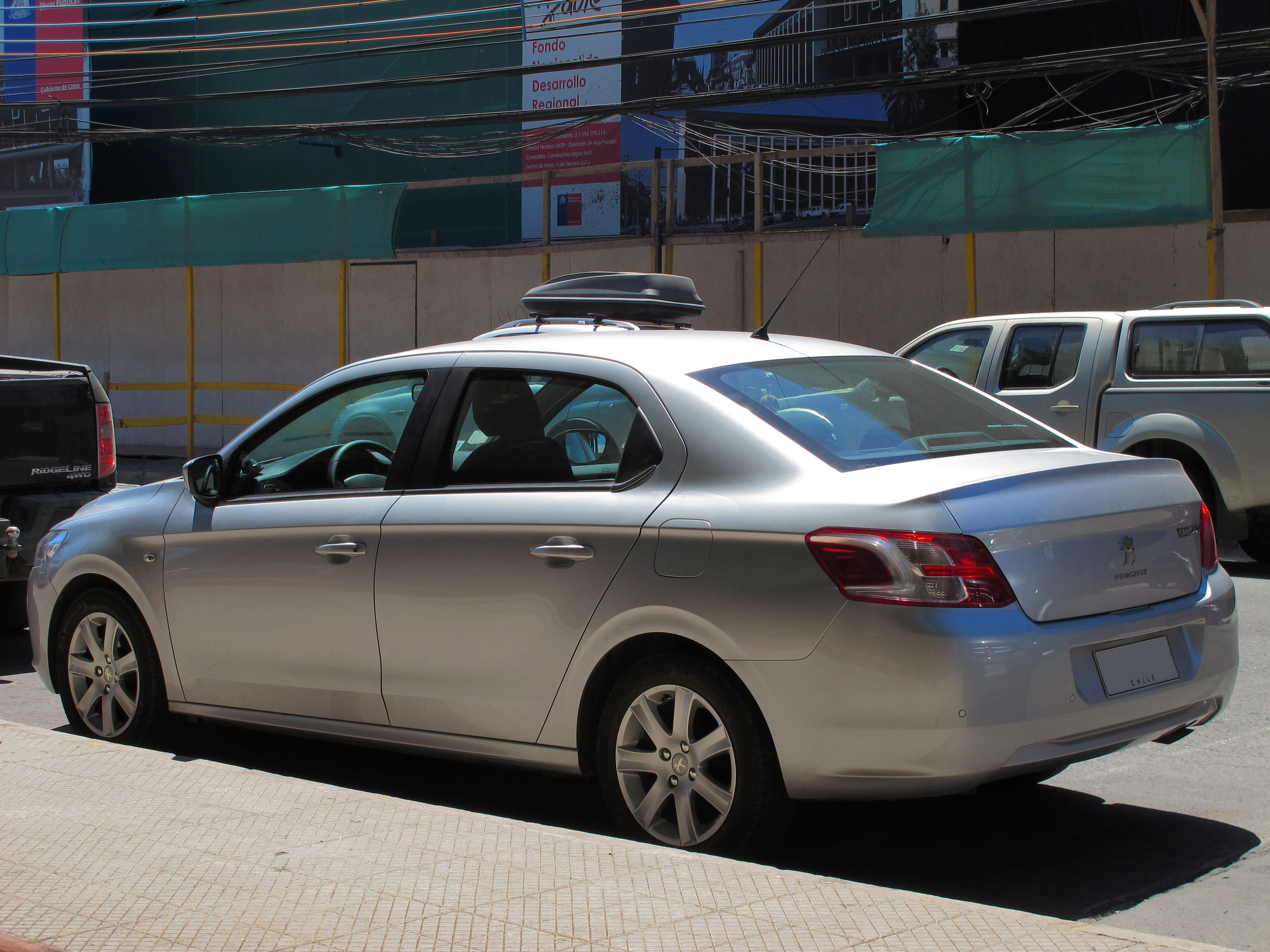 Peugeot 301 1.6 HDi Allure 2014